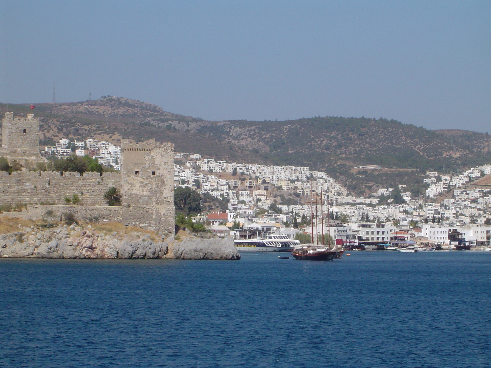 Sujet: Stad a Buerg vum Mier aus gesinn.